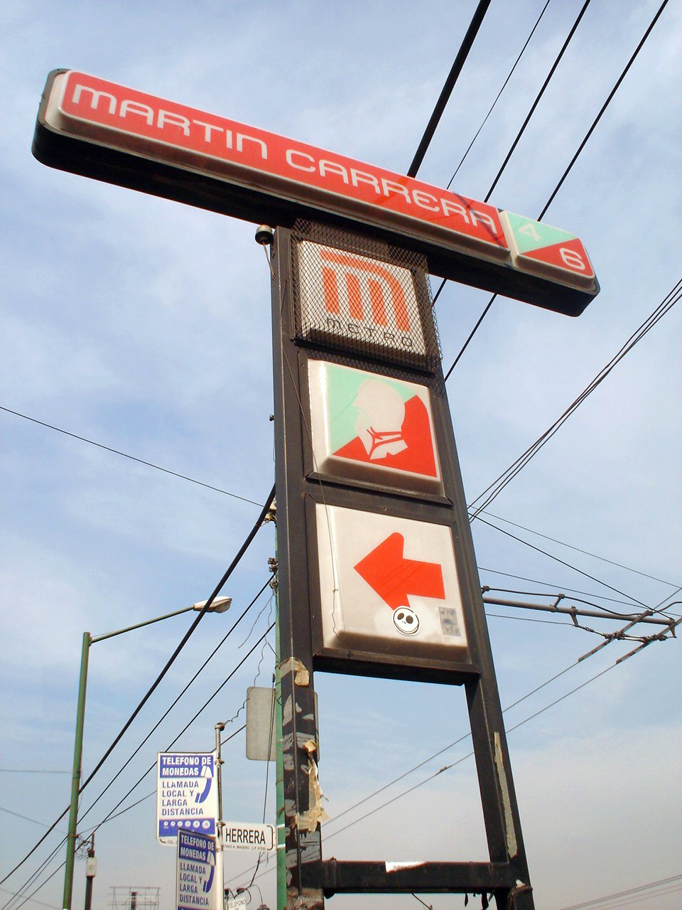 ESTACION MARTIN CARRERA